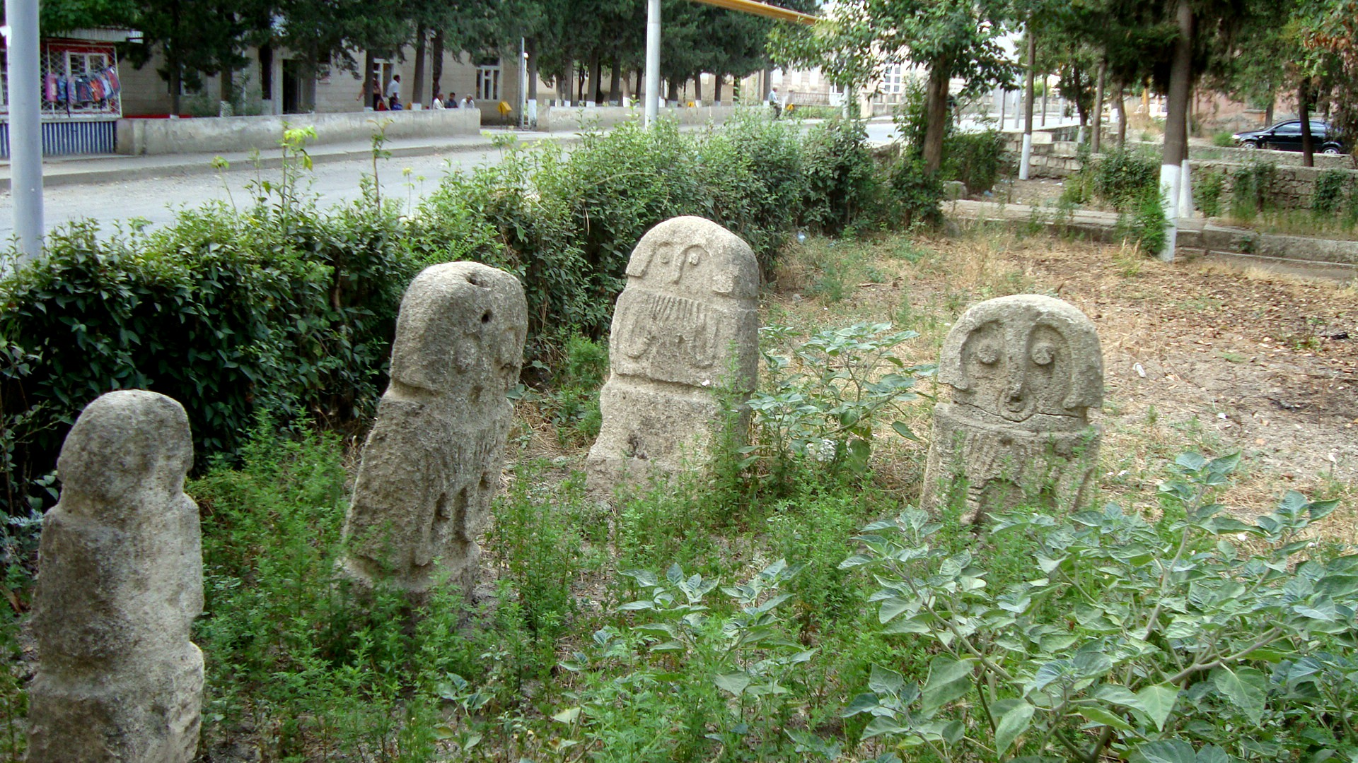 Khachkars. Martakert, Republic of Mountainous Karabakh (Artsakh).